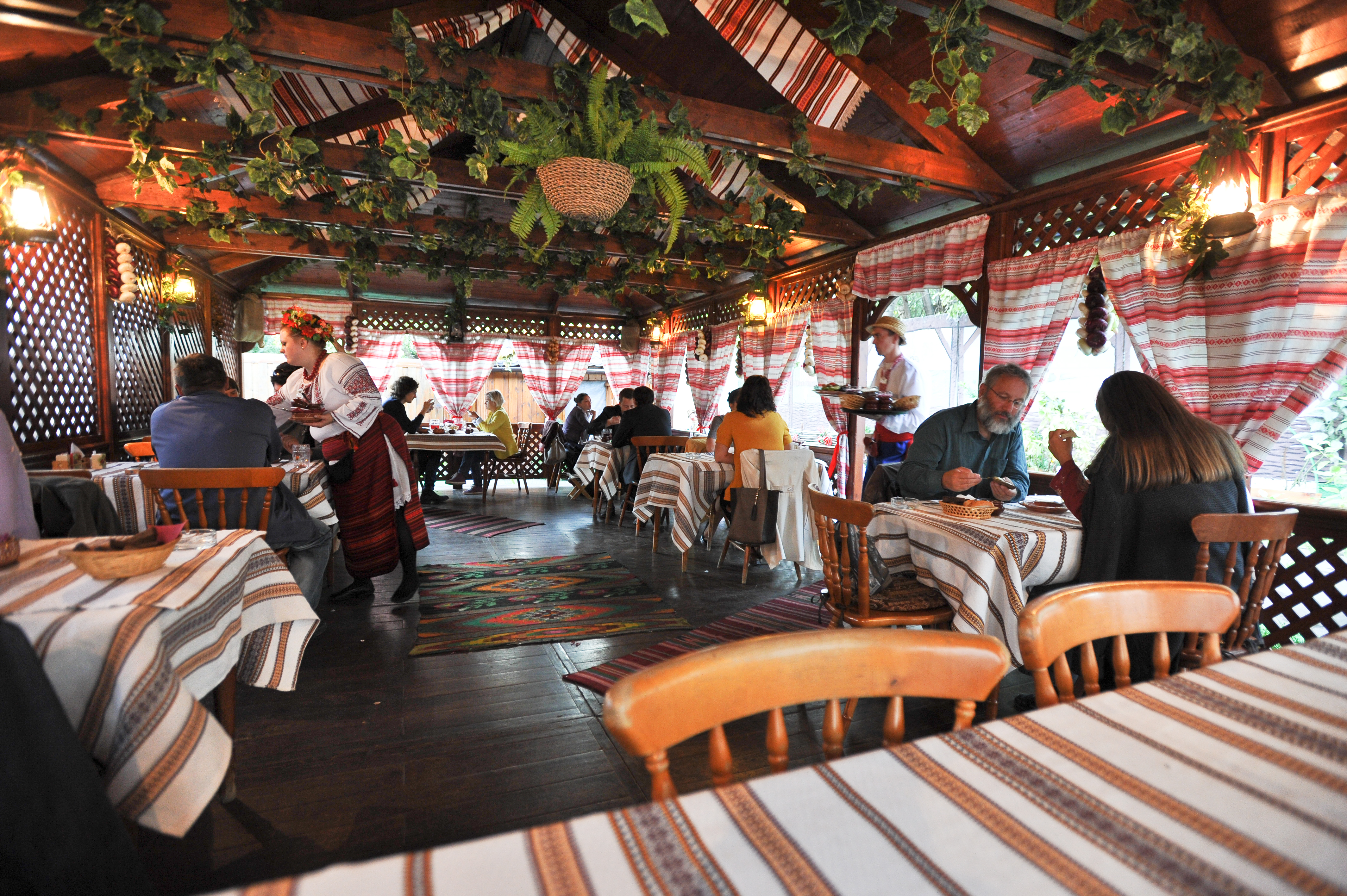 Интерьер Корчмы Тарас Бульба